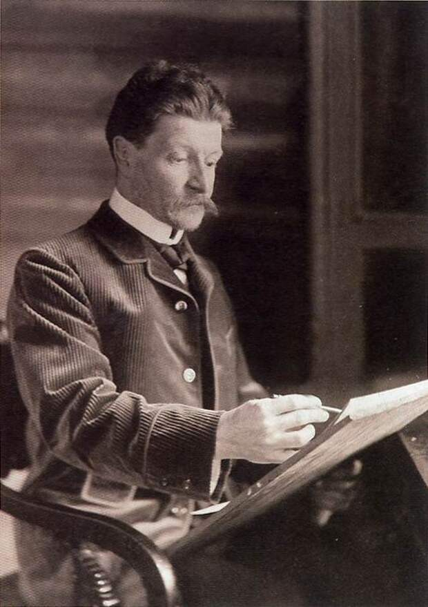 М.А. Врубель (1856 - 1910) за работой. Фото 1900-х годов